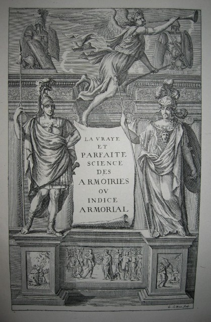 Couverture Fac-Simile